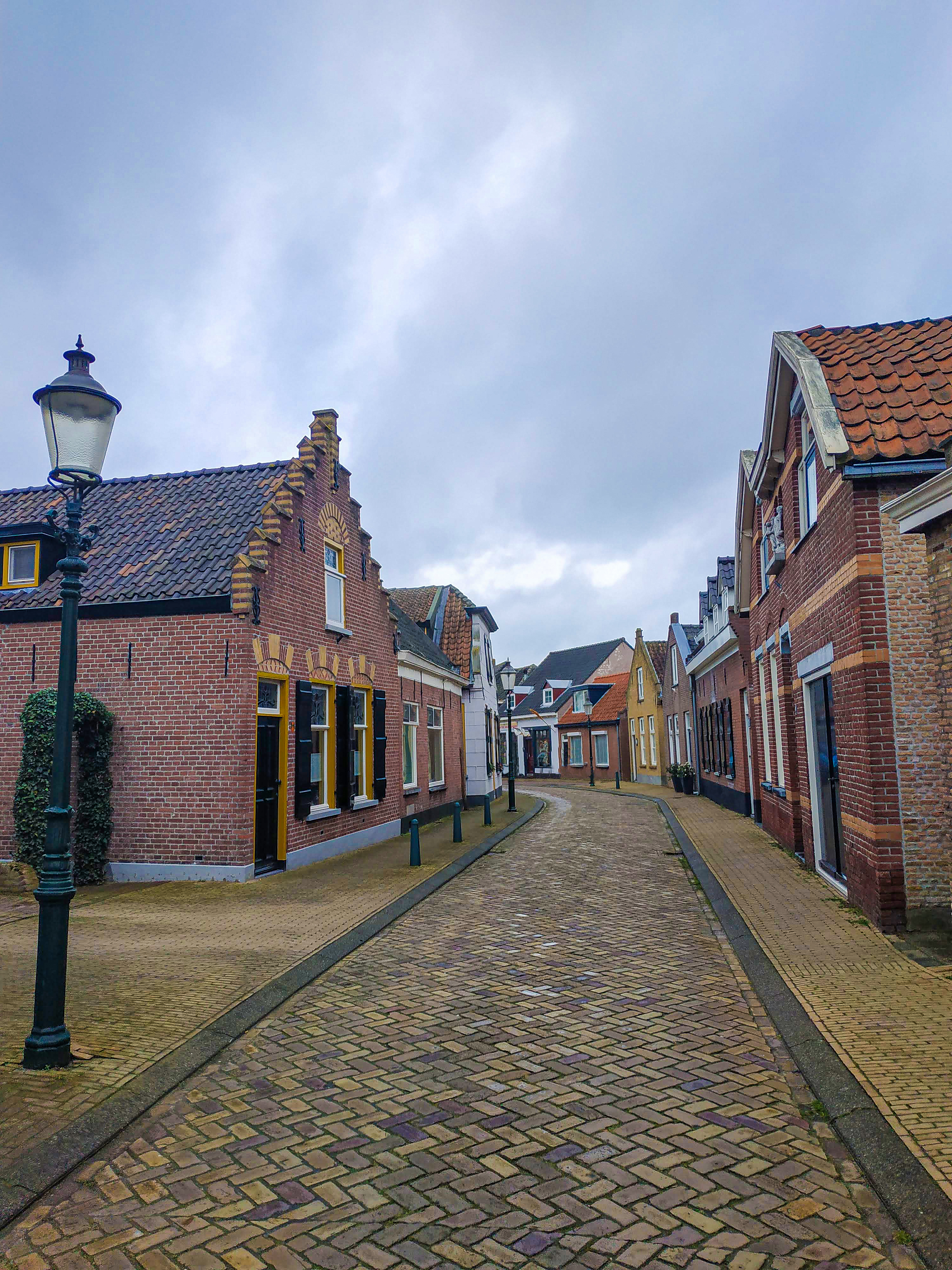 De historische Grote Kerkstraat in Raamsdonksveer.